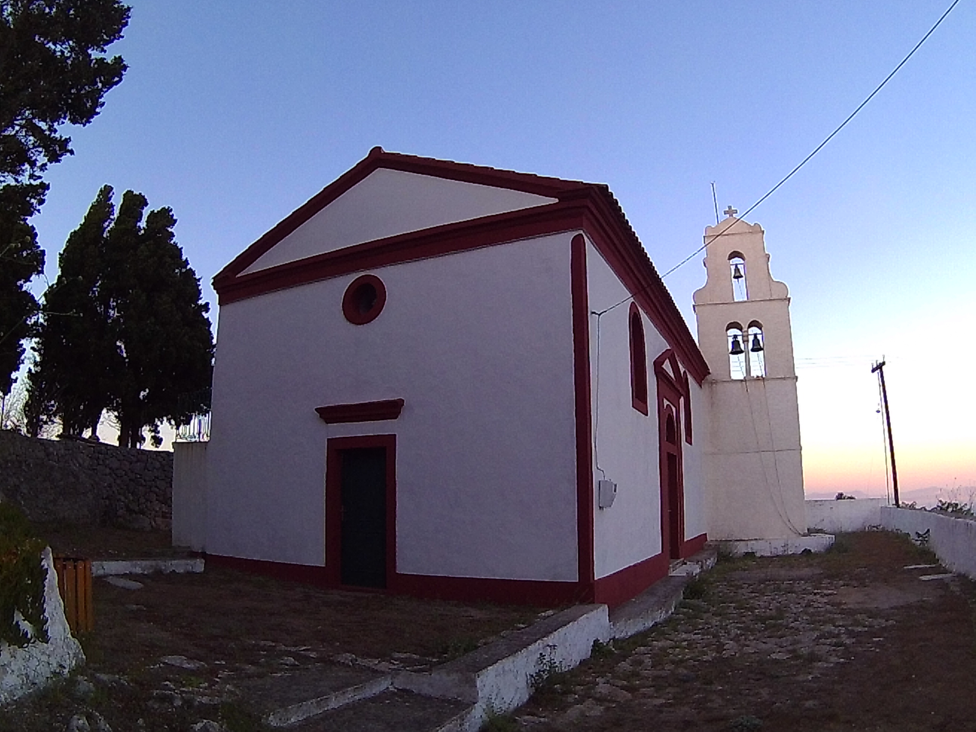 Άγιος Γεώργιος - Χωριό - Οθωνοί